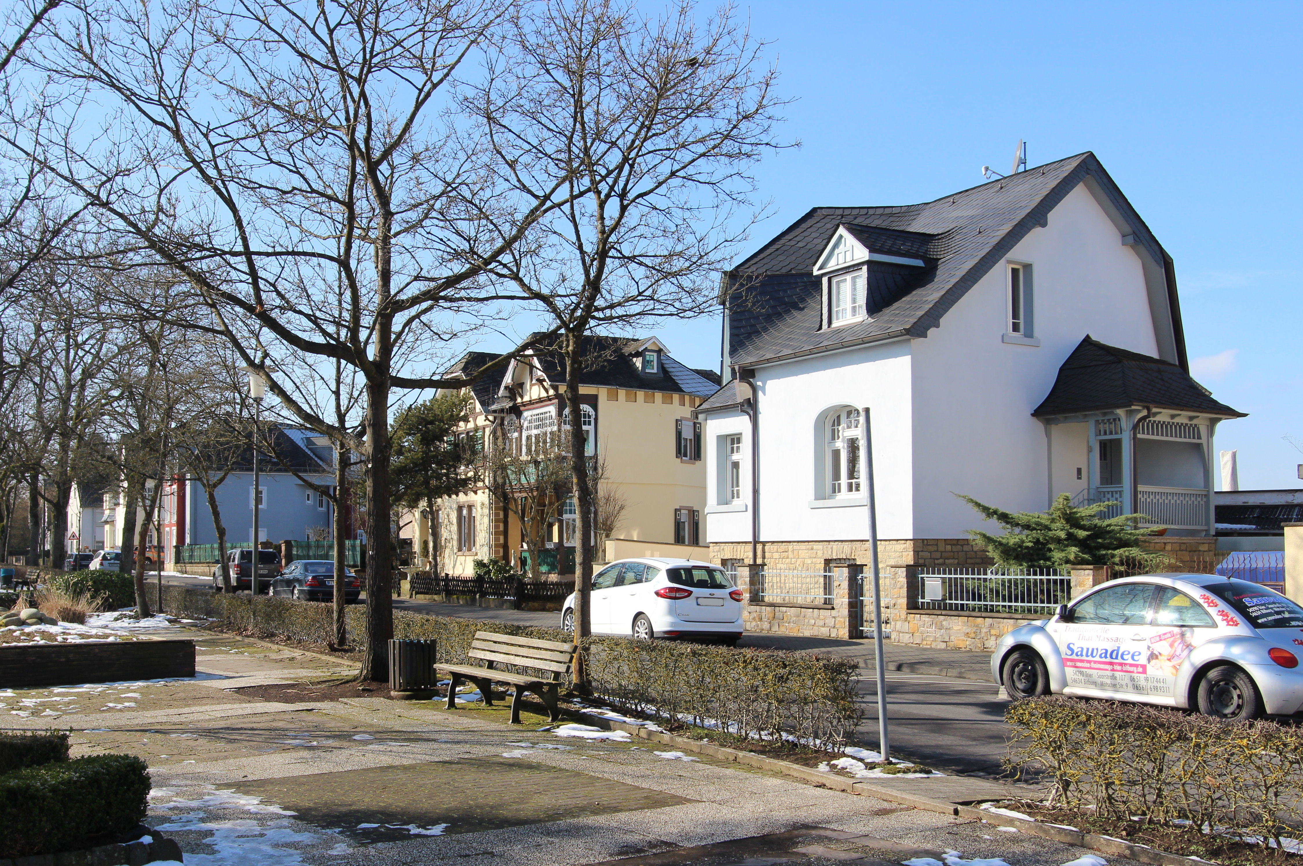 54634 Bitburg, Franz-Mecker-Straße. Einzel- und Doppelhäuser in villenartiger Gartenlage gegenüber dem Stadtpark, Späthistorismus, Heimatstil und Reformarchitektur, zwischen 1903 und 1913. 1912 wurde der am damaligen südwestlichen Stadtrand gelegene Kolmeshöher Weg nach dem ersten Leiter der Landwirtschaftsschule und Bitburger Ehrenbürger Dr. Franz-Mecker umbenannt. Aufnahme von 2018.